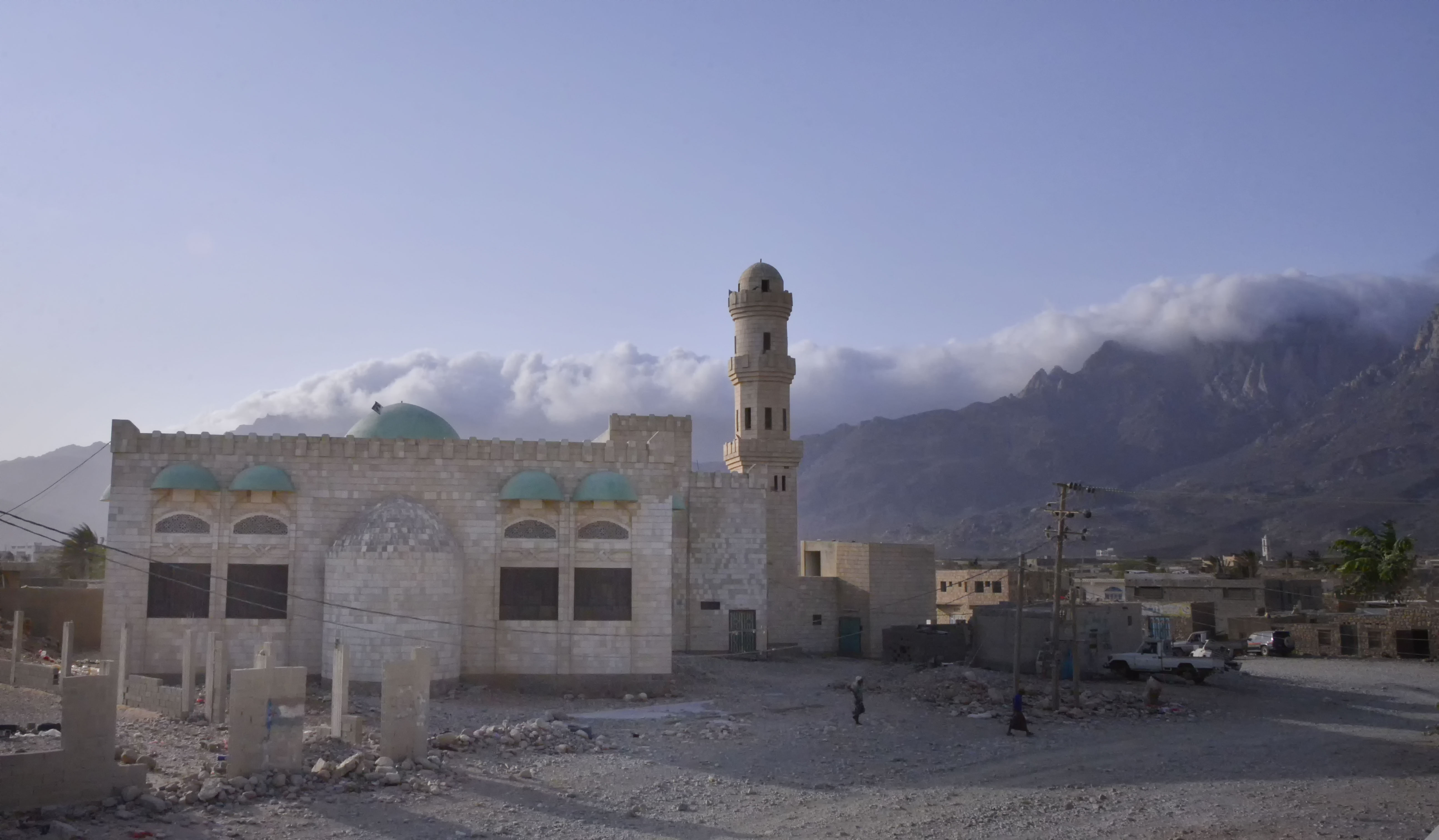 Mosque, Hadibo, Socotra Island